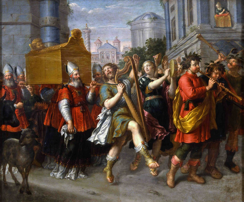 Die Überführung der Bundeslade durch den singenden und tanzenden König David